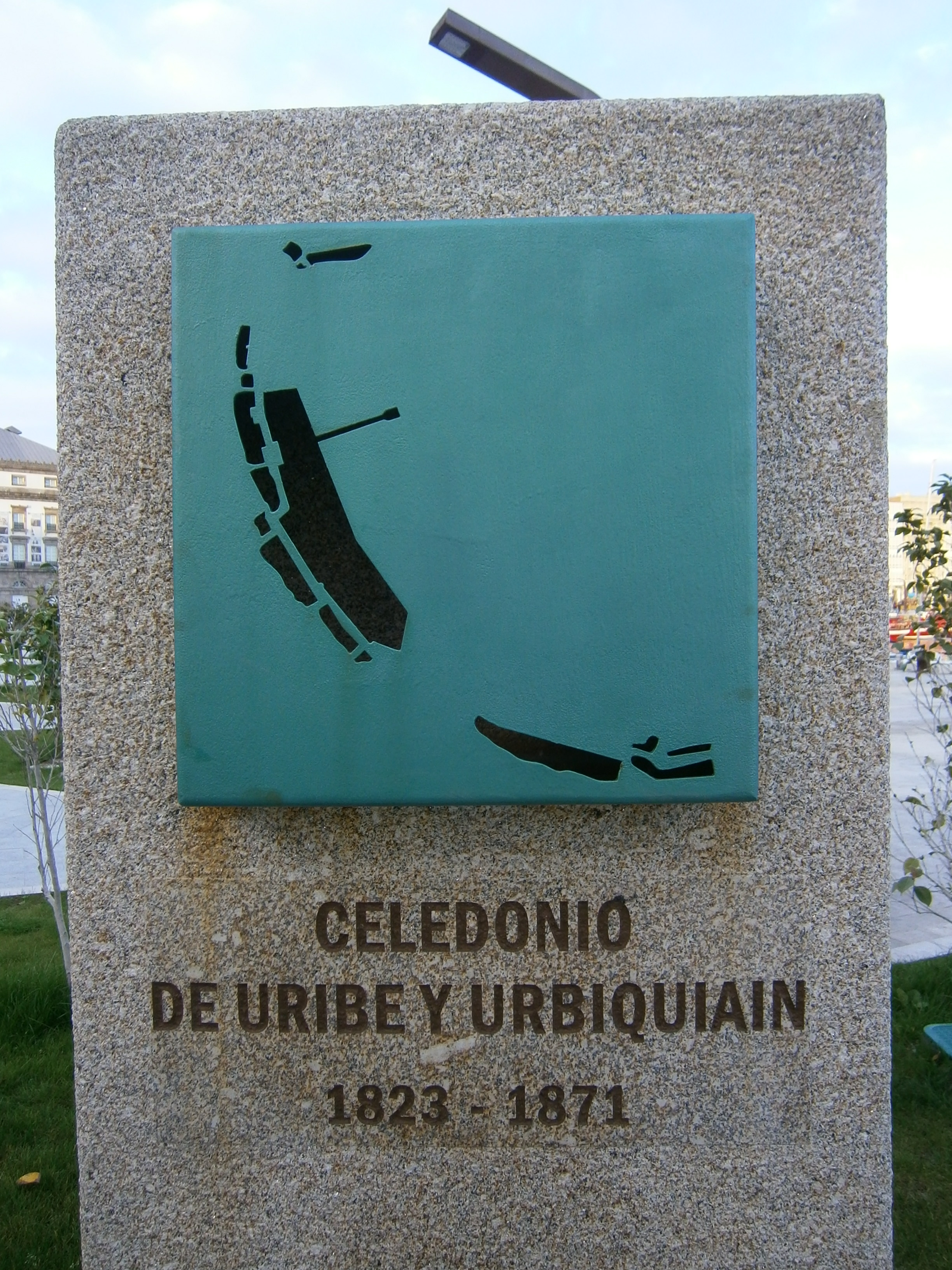 Placa coa ampliación do porto da Coruña do enxeñeiro Celedonio de Uribe